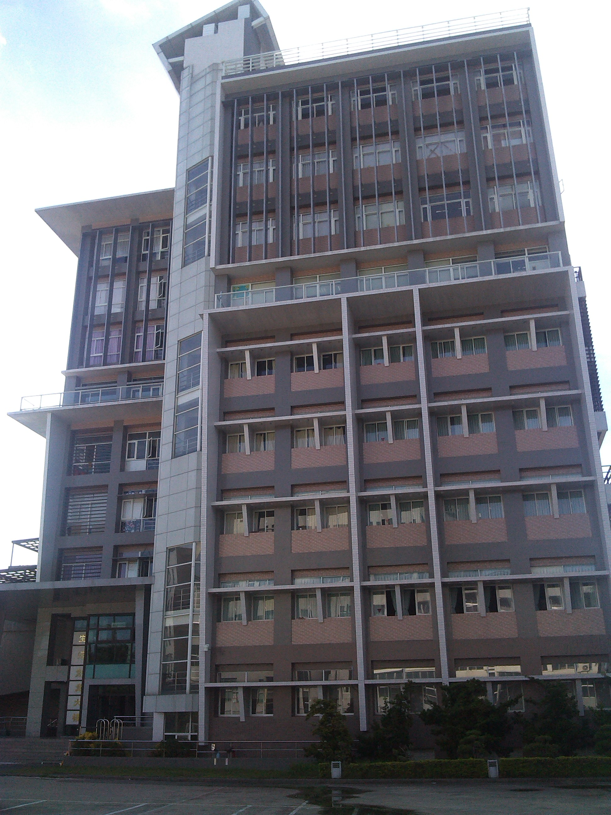 位於校區西南隅 2014年落成